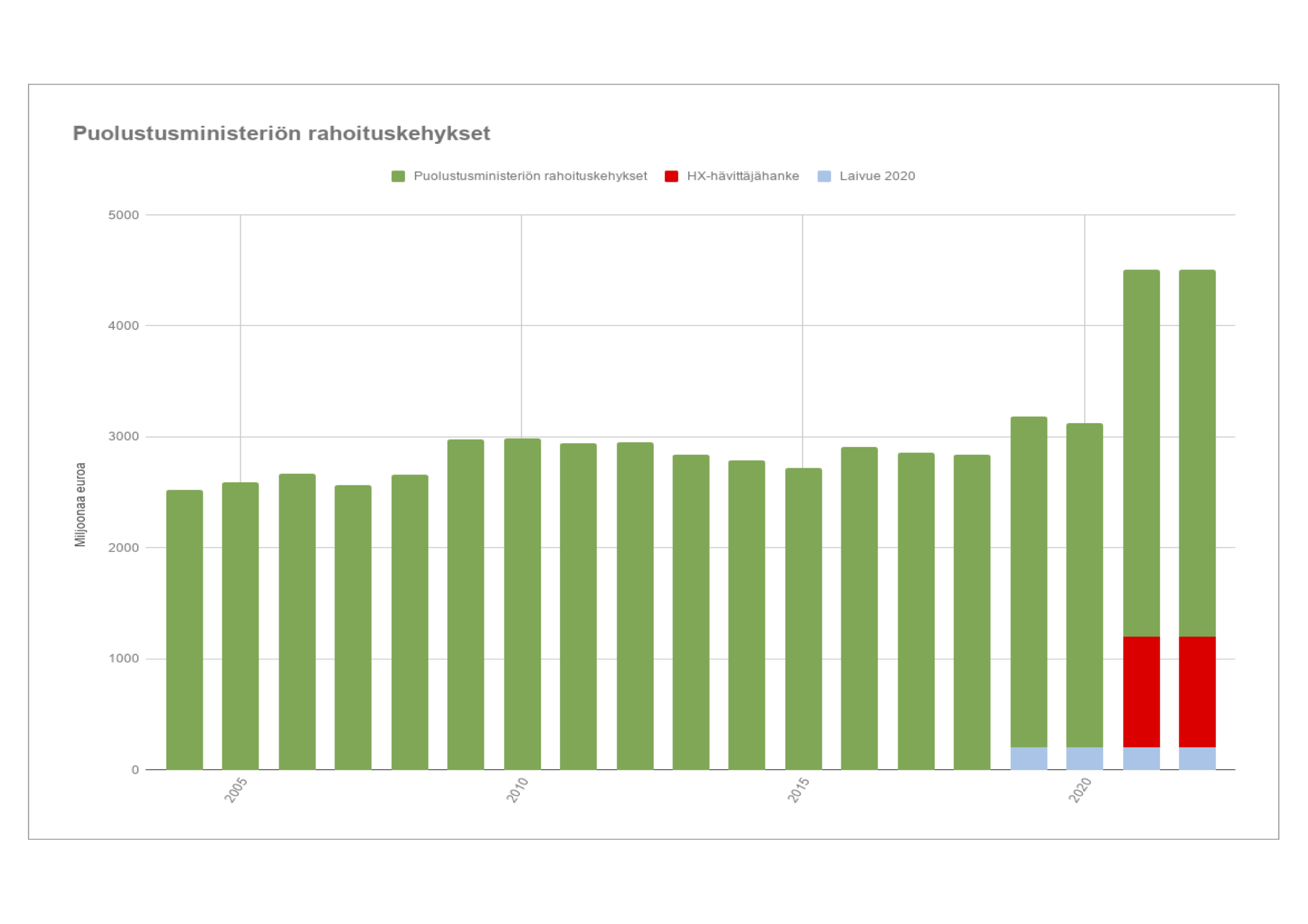 Puolustusvoimien strategisten suorituskykyhankkeiden (HX-hanke ja Laivue 2020 -hanke) vaikutus puolustusministeriön budjettikehykseen